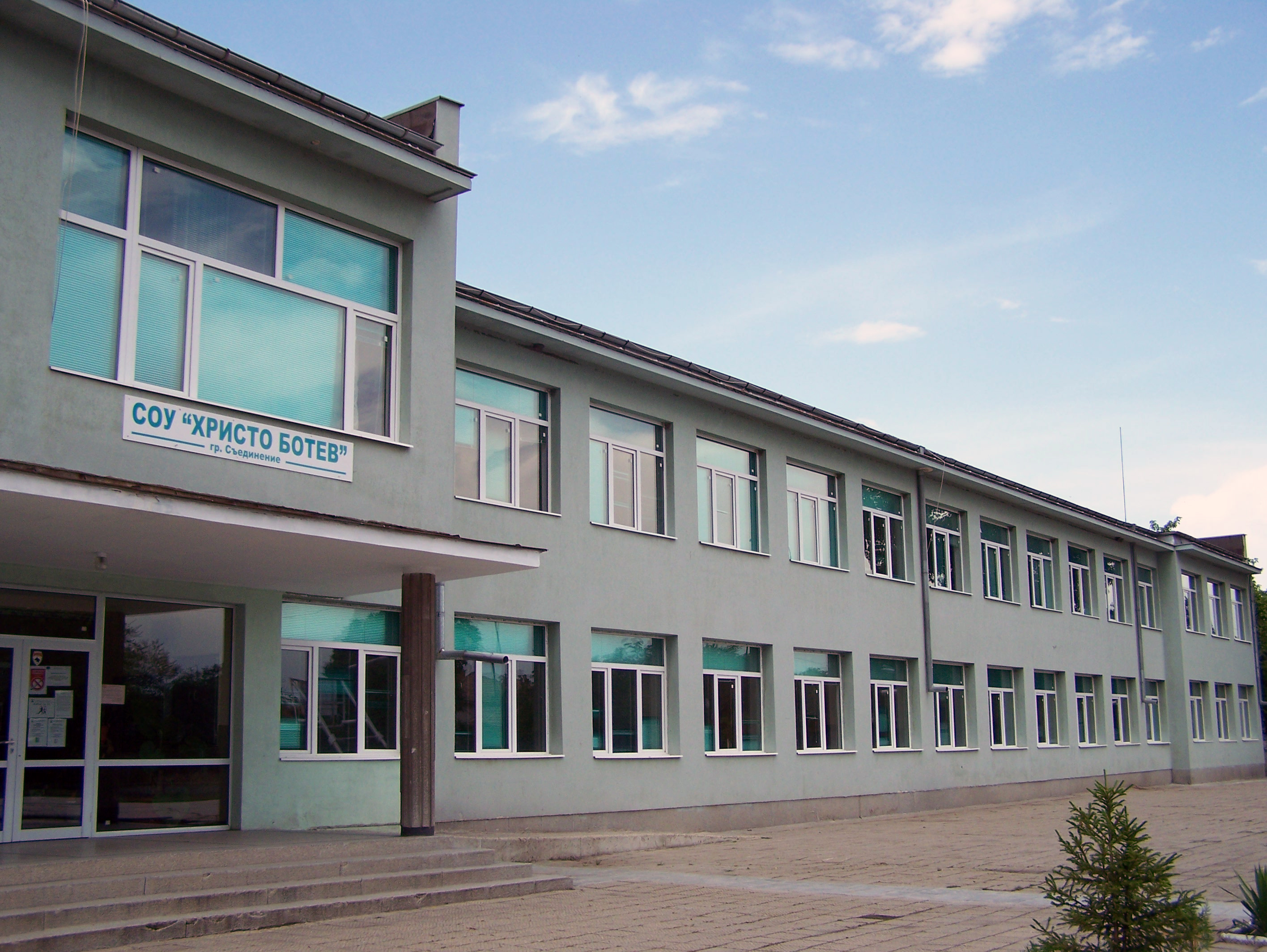 СОУ "Христо Ботев" град Съединение - сграда на начален етап